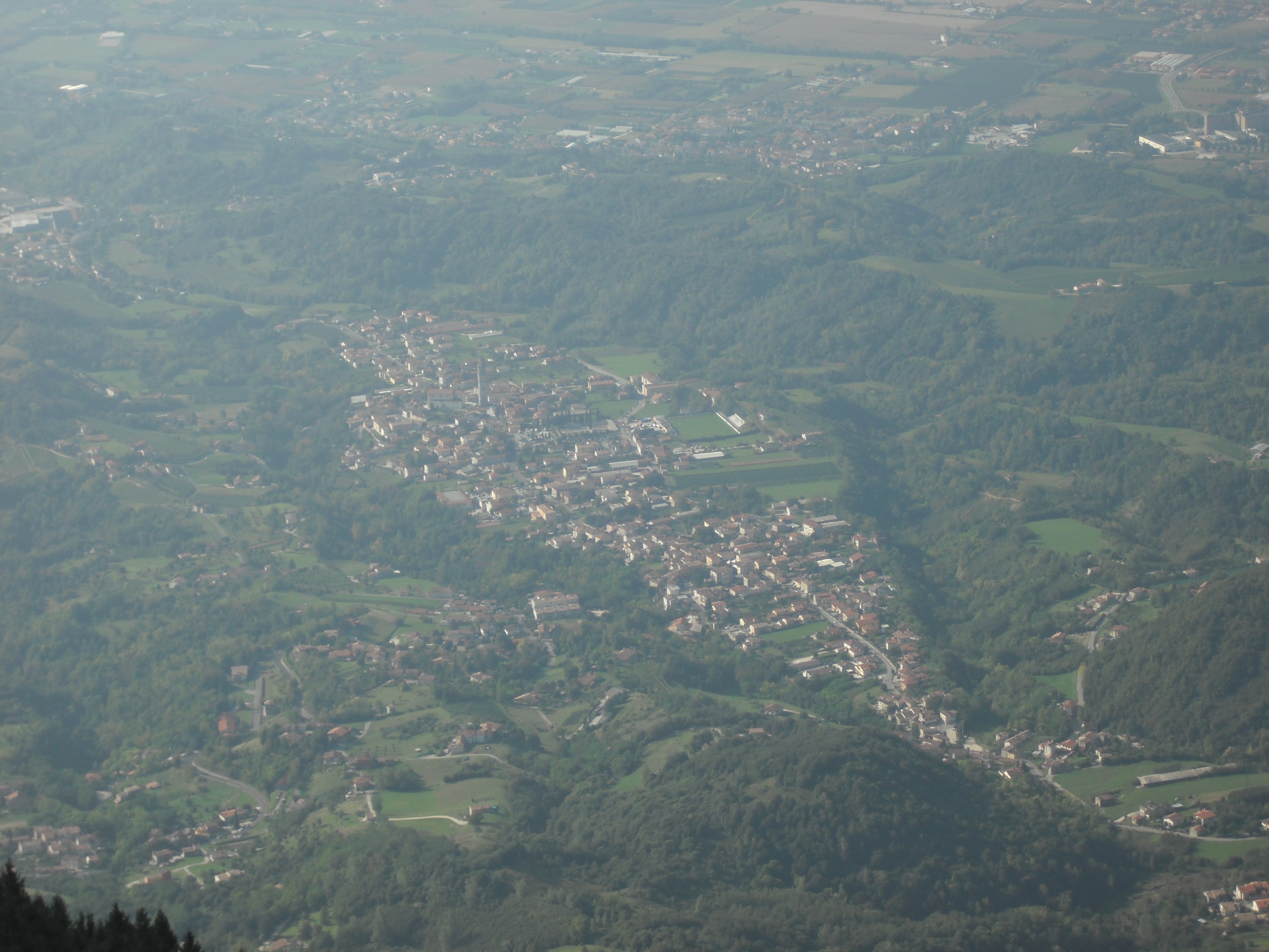 L'abitato di Fregona-Mezzavilla-Piai visto dal monte Pizzoc.